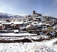 Hervás nevado